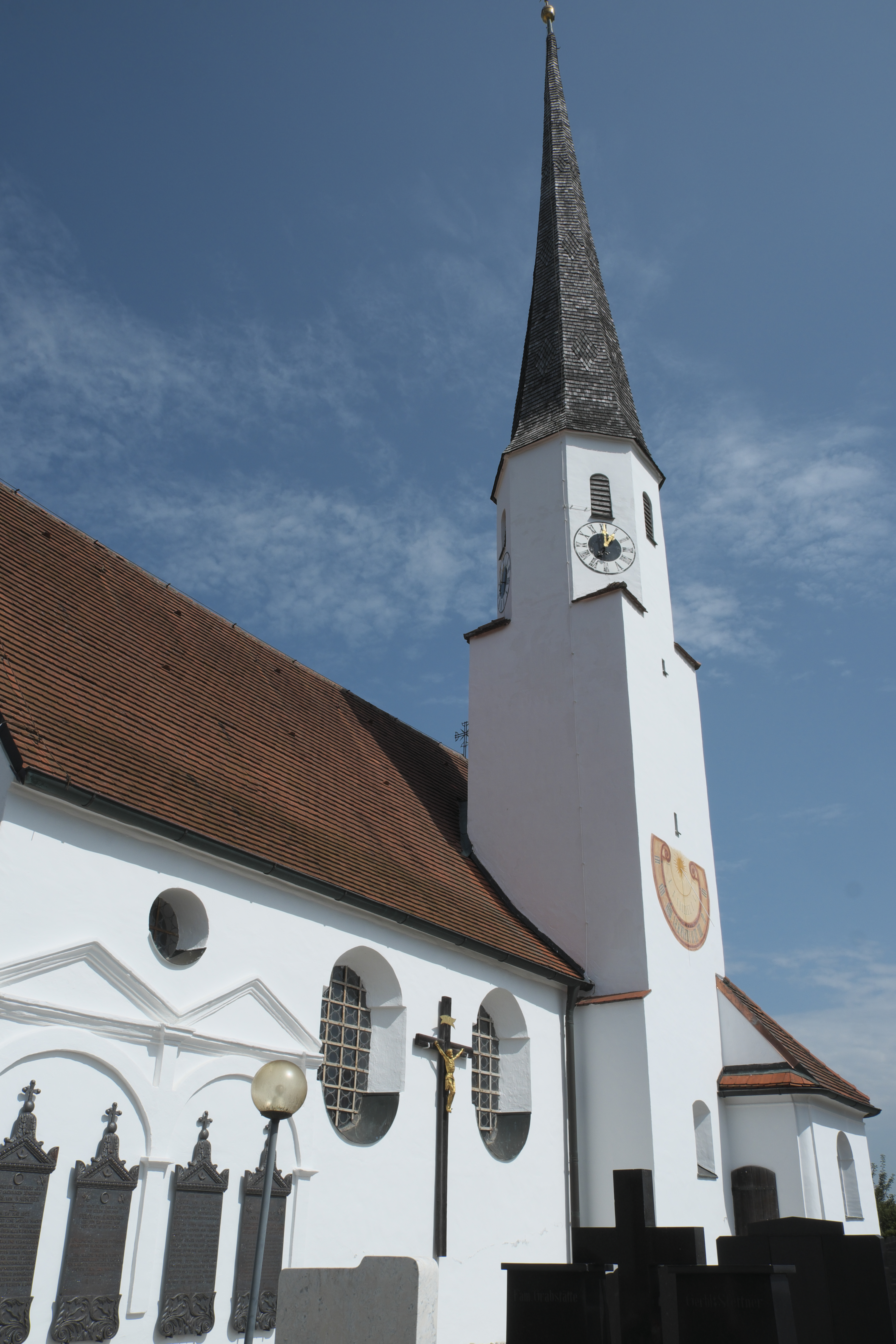 Katholische Filialkirche St. Martin in Niederstraubing (Steinkirchen) im Landkreis Erding (Bayern/Deutschland), Turm mit Spitzhelm